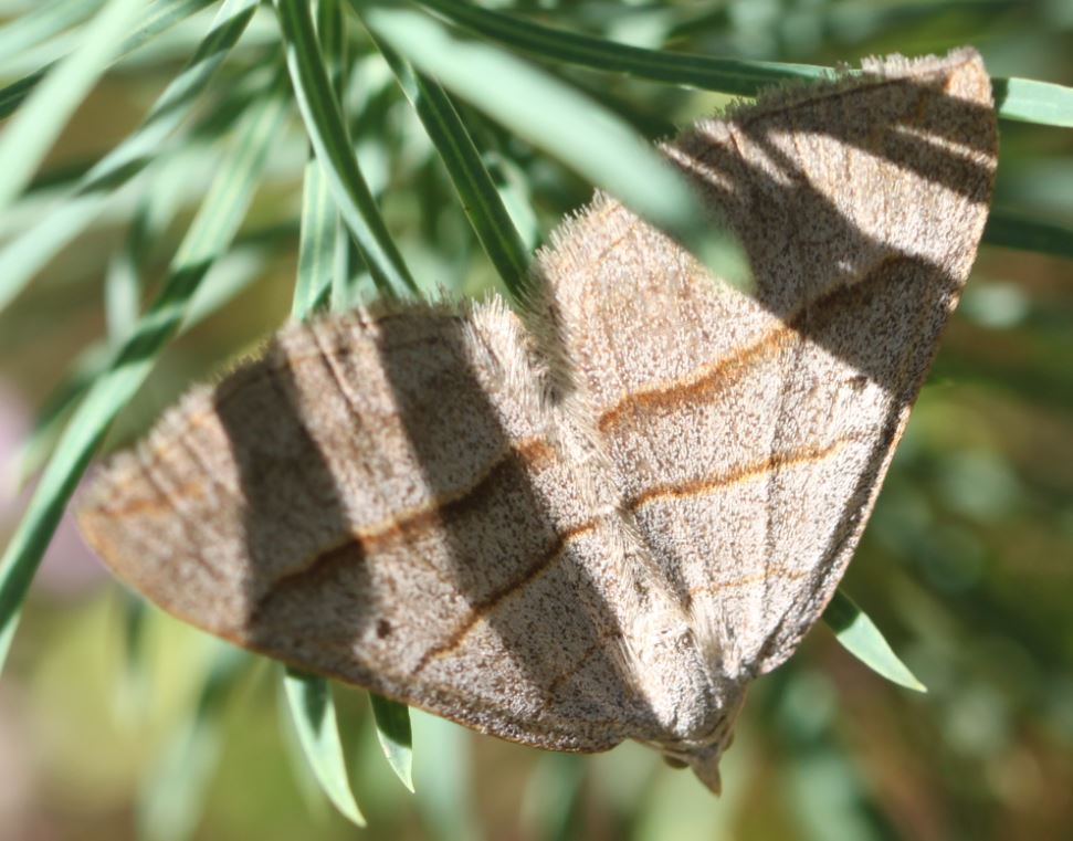 Braungrauer Wellenstriemenspanner (Scotopteryx luridata) am 23.8.2016 in der Schwetzinger Hardt